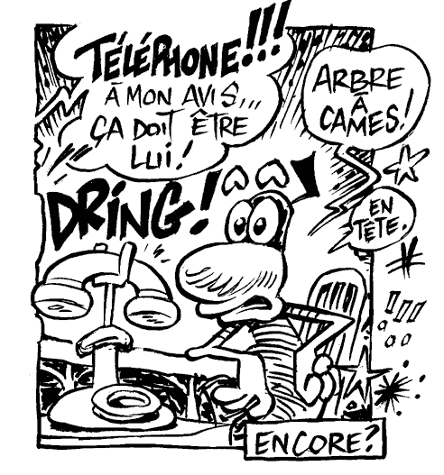 "Le bain de minuit", une aventure du Concombre masqué